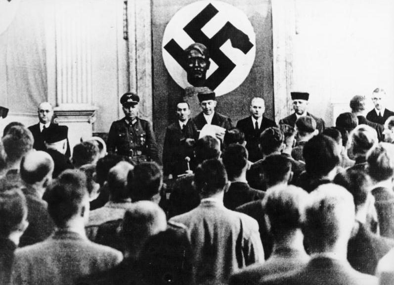 This description has been identified as biased or incorrect: GDR-POV interpretationZentralbild 18.7.1964 Zum 20. Juli 1944 Während Oberst Stauffenberg mit einigen seiner Mitkämpfer bereits wenige Stunden nach dem Attentat im Hof des Oberkommandos des Heeres in der Bendlerstrasse erschossen worden waren, tobte sich die Freislersche Blutjustiz gegen mehrere andere Beteiligte der Verschwörung im sogenannten "Volks"-Gerichtshof in Prozessen aus. UBz: [Roland] Freisler bei der Urteilsverkündung in einem der genannten Prozesse.